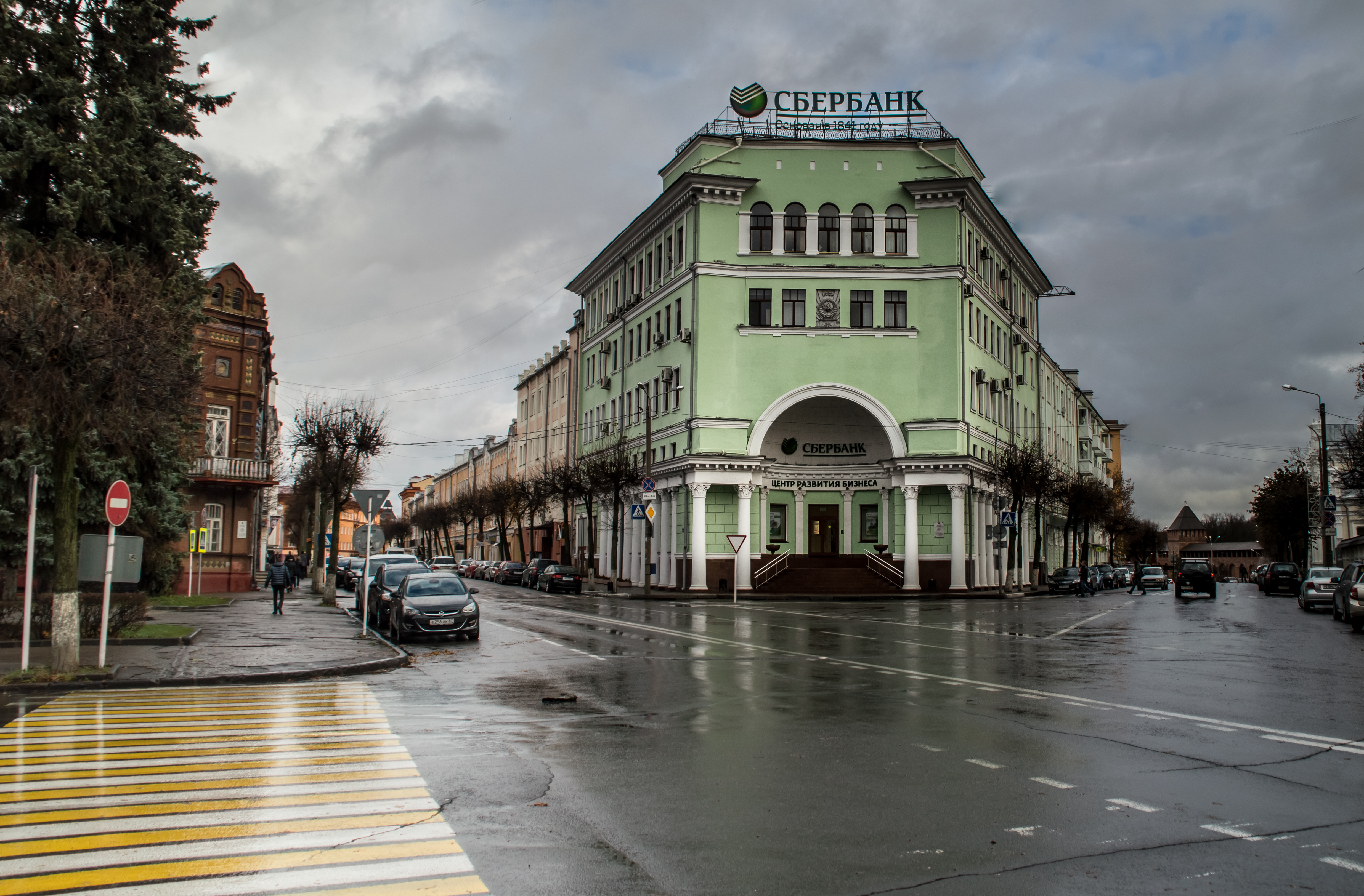 Центральная Сберкасса (Смоленская область, Смоленск, улица Коммунистическая, 8/5)